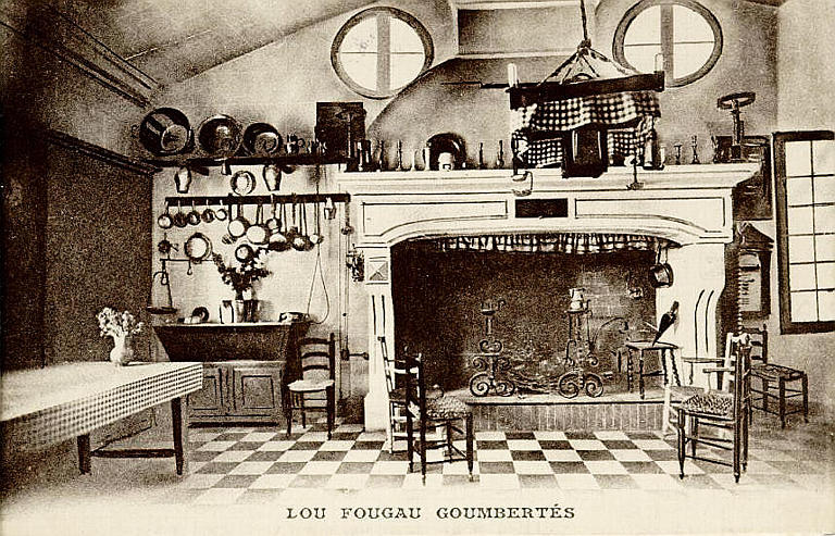 Lou fougau goumbertes Musée du terroir Marseillais à Château Gombert